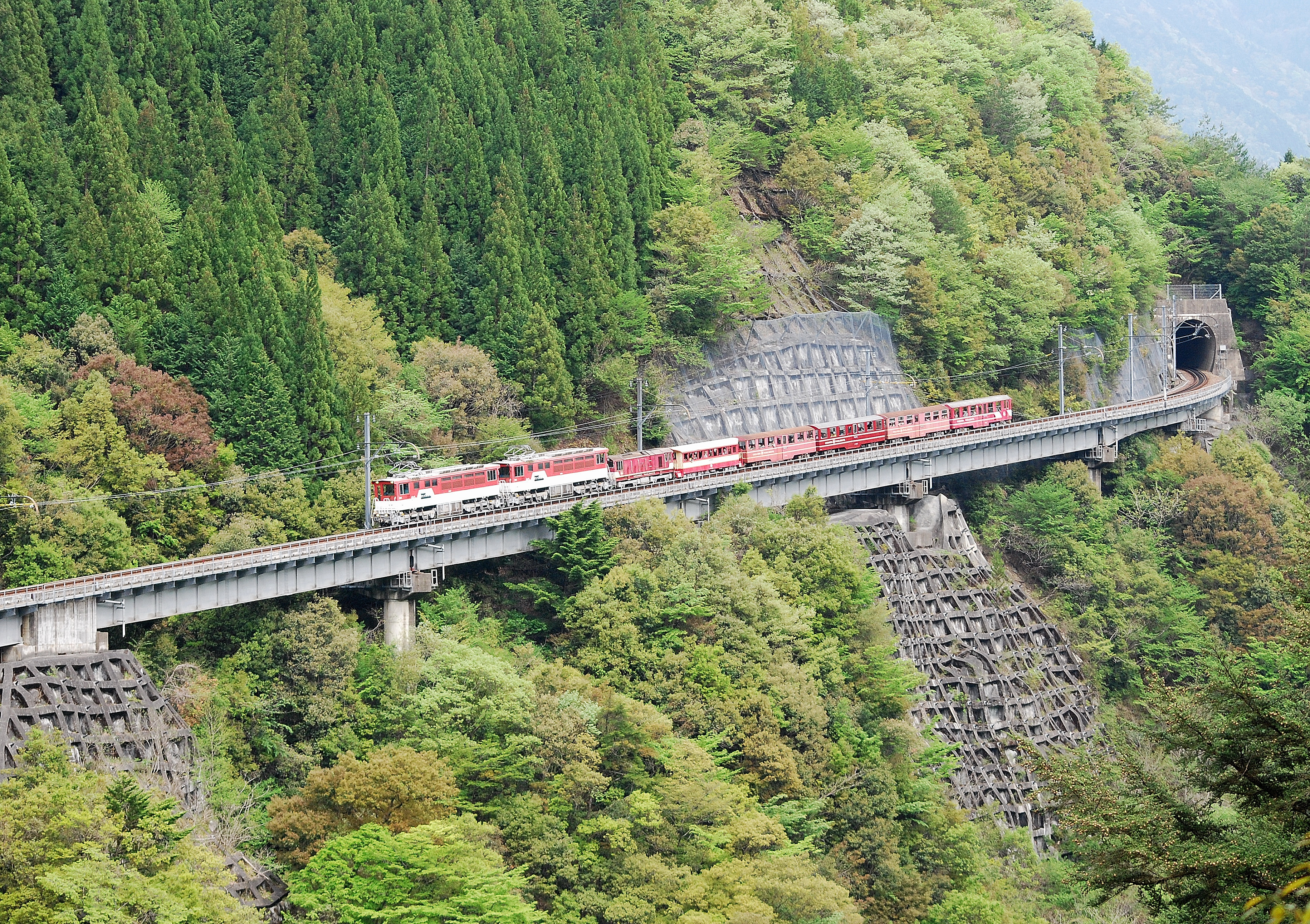 大井川鐵道井川線のアプトいちしろ-長島ダム間のアプト区間を走行する為、ED90形電気機関車を麓側に2両連結して走行する井川線の列車。（公道から撮影）